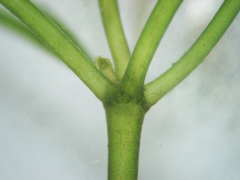 Stern-Armleuchteralge Nitellopsis obtusa, Müritz-Gebiet